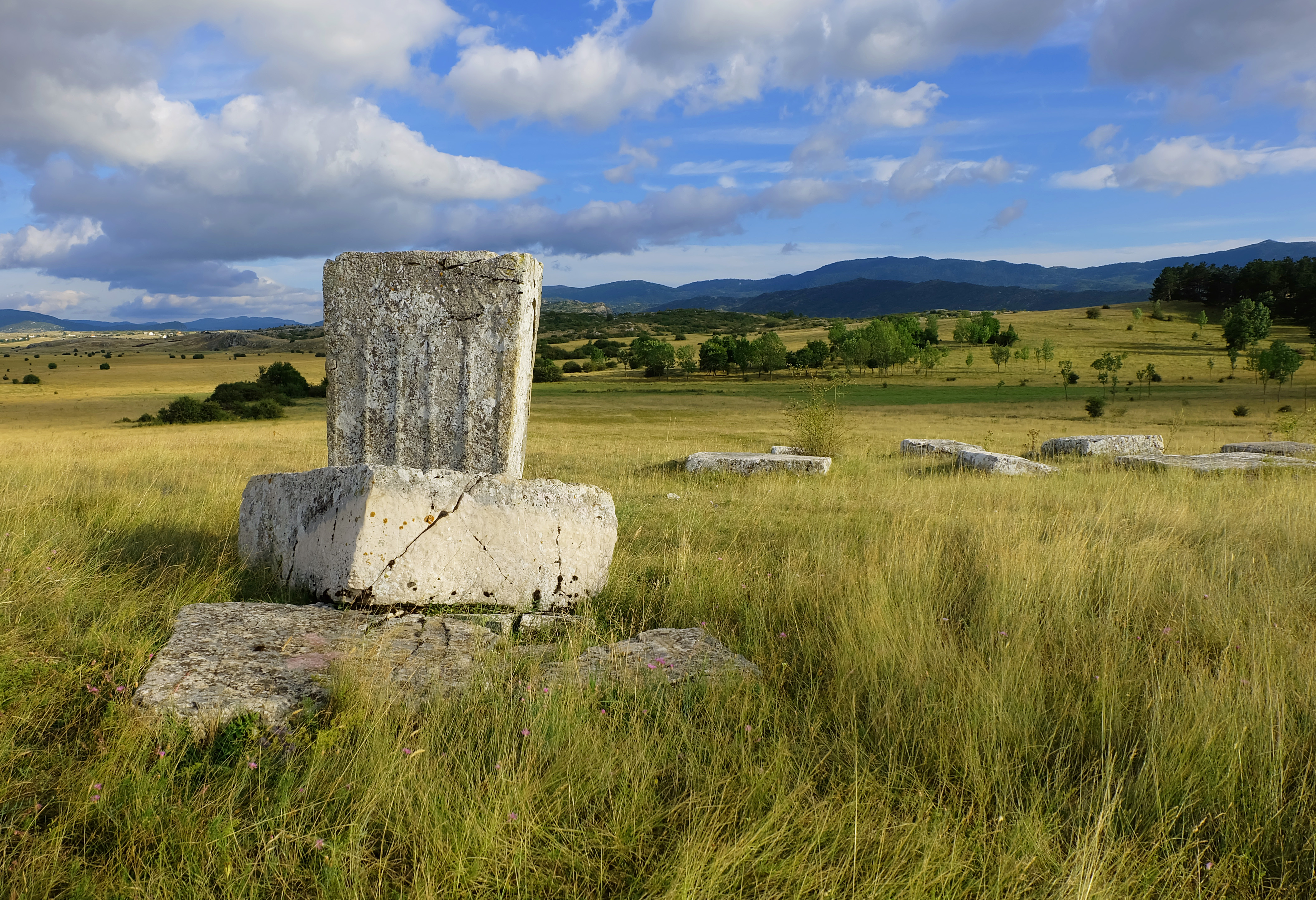 NKD293 Nekropola stećaka - Velike Grebenice